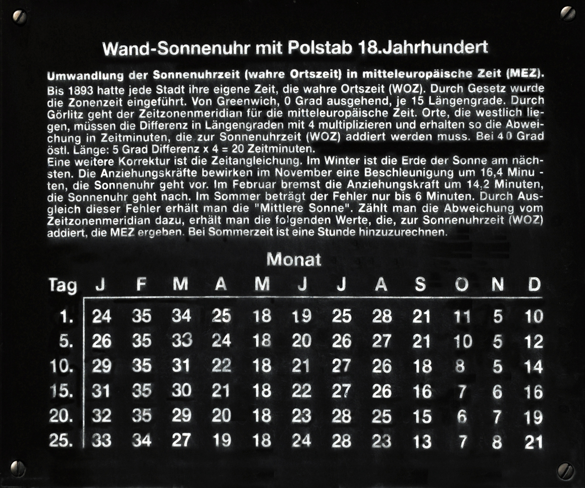 Die abgebildete Tafel enthält unter der Überschrift "Wand-Sonnenuhr mit Polstab 18.Jahrhundert" die Erläuterungstafel für die Vertikal-Sonnenuhr, die zusammen mit der am 28. Mai 1998 von Erich Pollähne gelieferten Vertikal-Sonnenuhr an der südlichen Außenseite der Marienkirche von Wülfingen montiert wurde. Die Fotographie wurde am öffentlichen Weg zur Kirche aufgenommen und fällt unter die Panoramafreiheit.